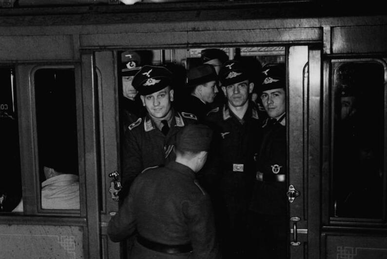 Paris. "Der Kontakt". Freie Fahrt auf der Metro, der Pariser Untergrundbahn, haben alle Angehörige der Wehrmacht. Sie fahren in der ersten Klasse. Bildberichter: Jäger Text: Uetrecht